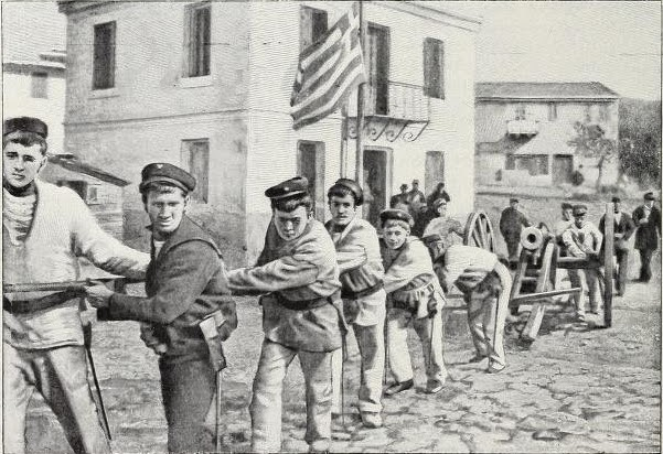 Aποβίβαση Ελλήνων στρατιωτών στη Σαλαώρα και μεταφορά ενός τουρκικού κανονιού κατά τη διάρκεια του Ελληνοτουρκικού πολέμου του 1897. Η ελληνική σημαία που βλέπουμε ήταν η μοναδική που ανέβηκε σε τουρκικό κτίριο σε όλη τη διάρκεια του πολέμου.